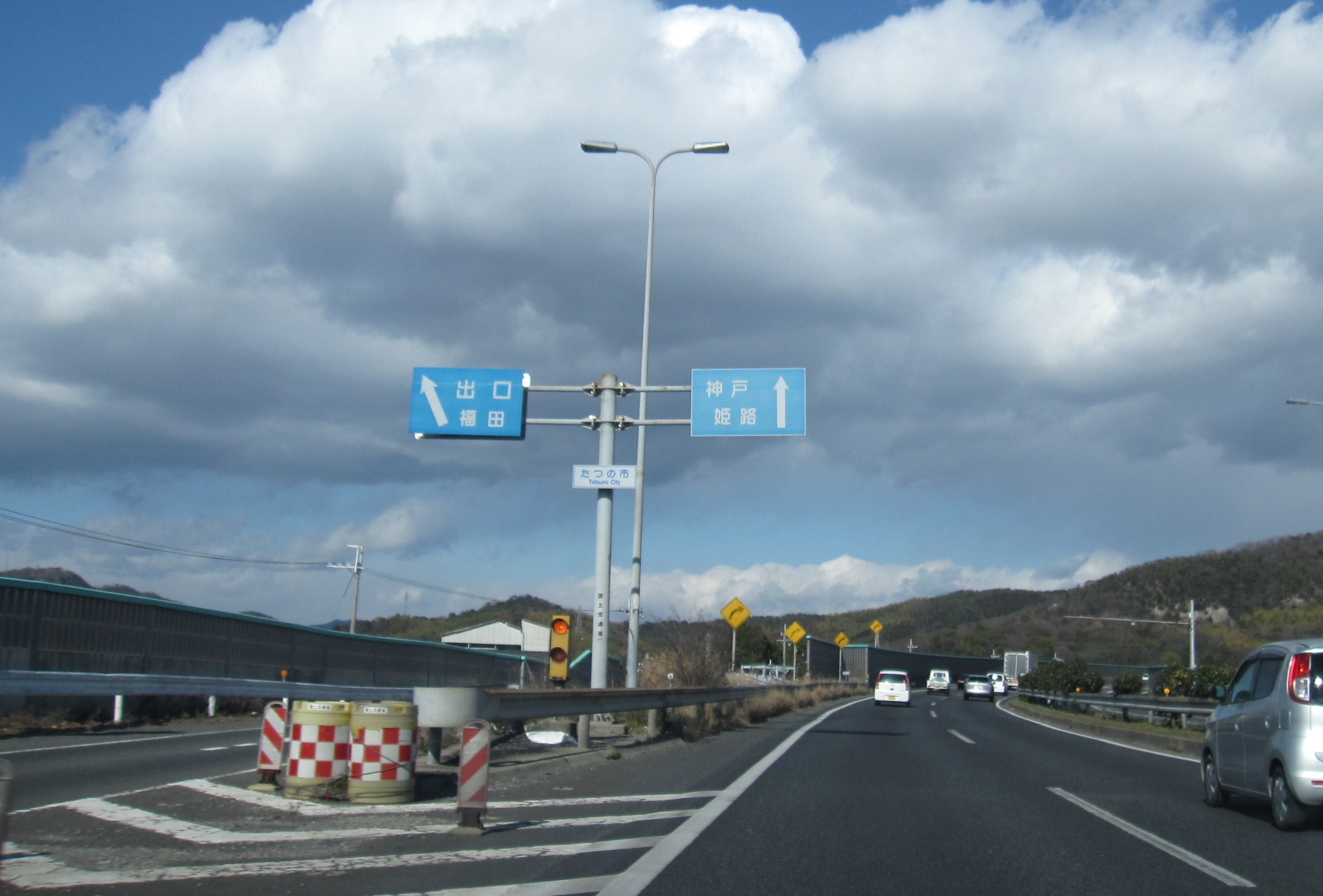 太子竜野バイパス福田ランプ